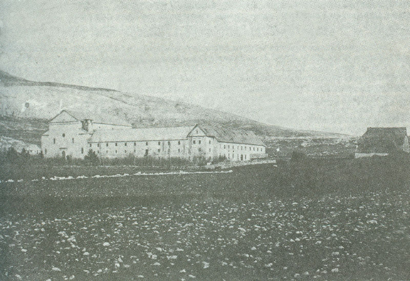 Crkva i Samostan na Gorici 1879. godine